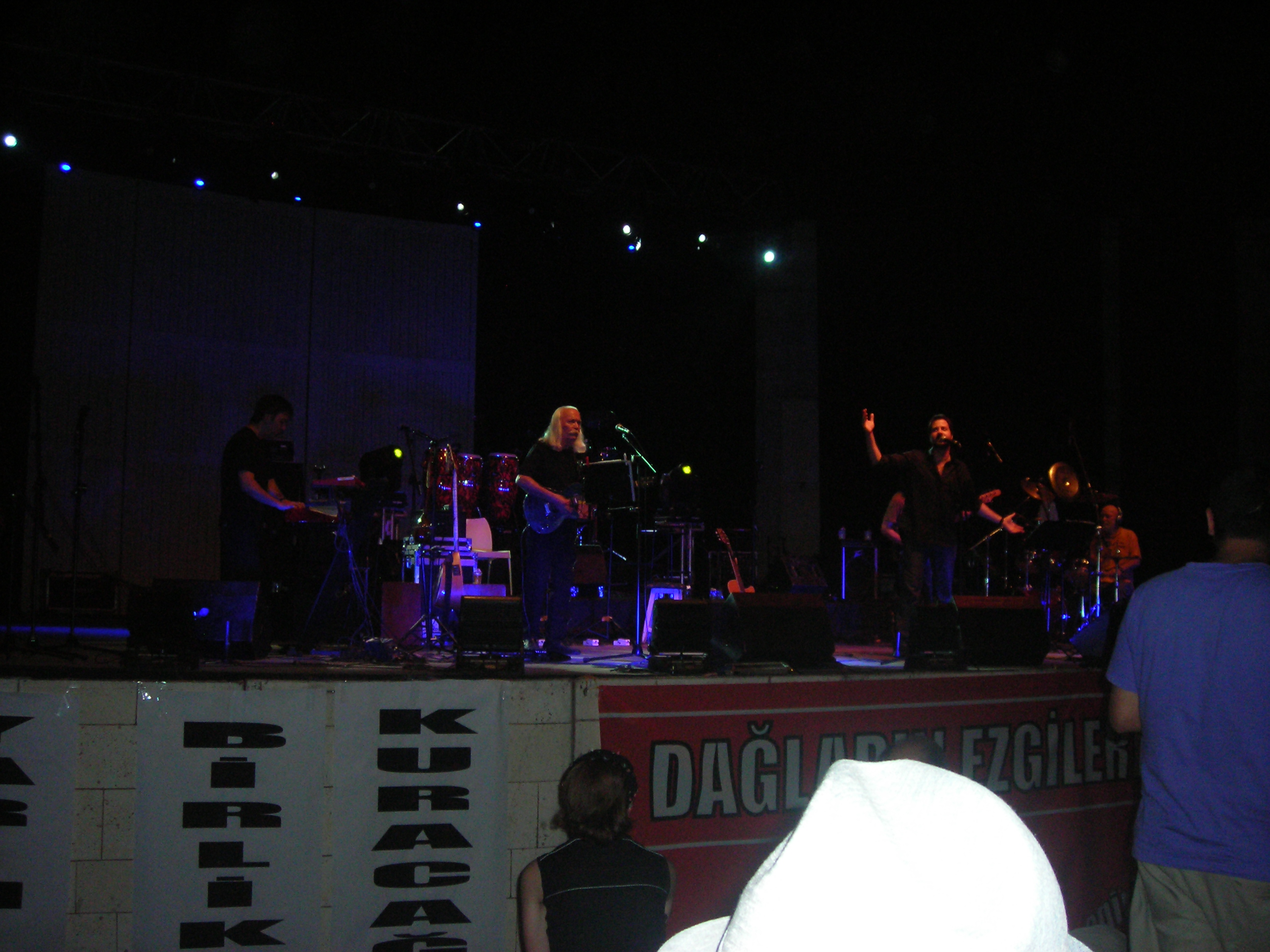 Moğollar, 3 Temmuz 2009 konseri, Istanbul